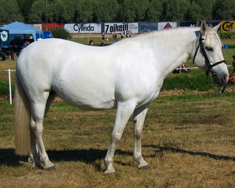 Connemaranponitamma Coneridge Catriona 172 C